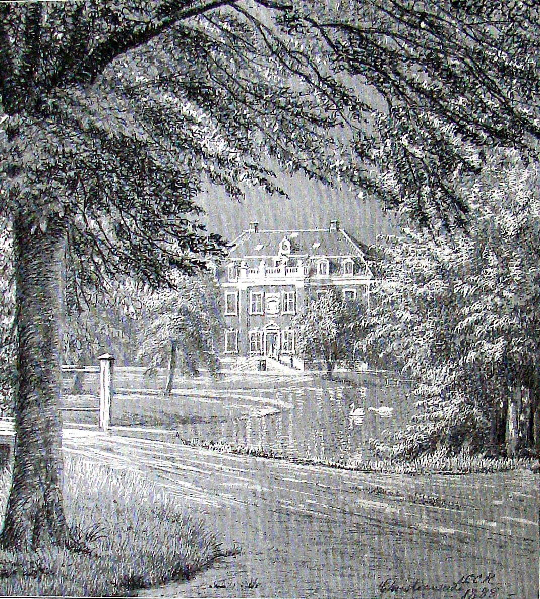 Christianssæde er en gammel hovedgård i Rødby Kommune på Lolland, Denmark